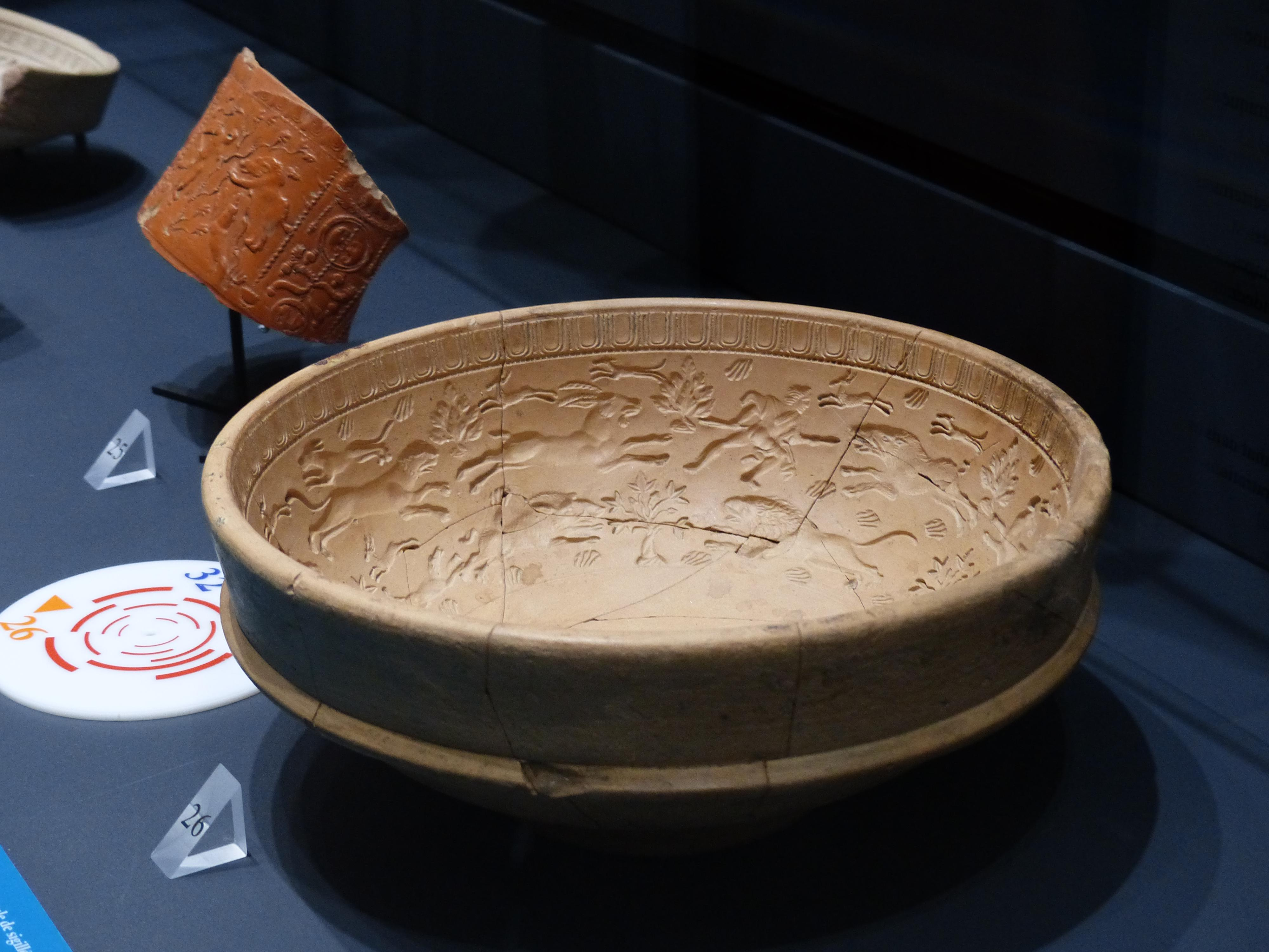 Musée de la Céramique de Lezoux (Puy-de-Dôme). Moule d'une coupe de céramique sigillée gallo-romaine de Lezoux. Forme Drag 37. Scène de chasse.